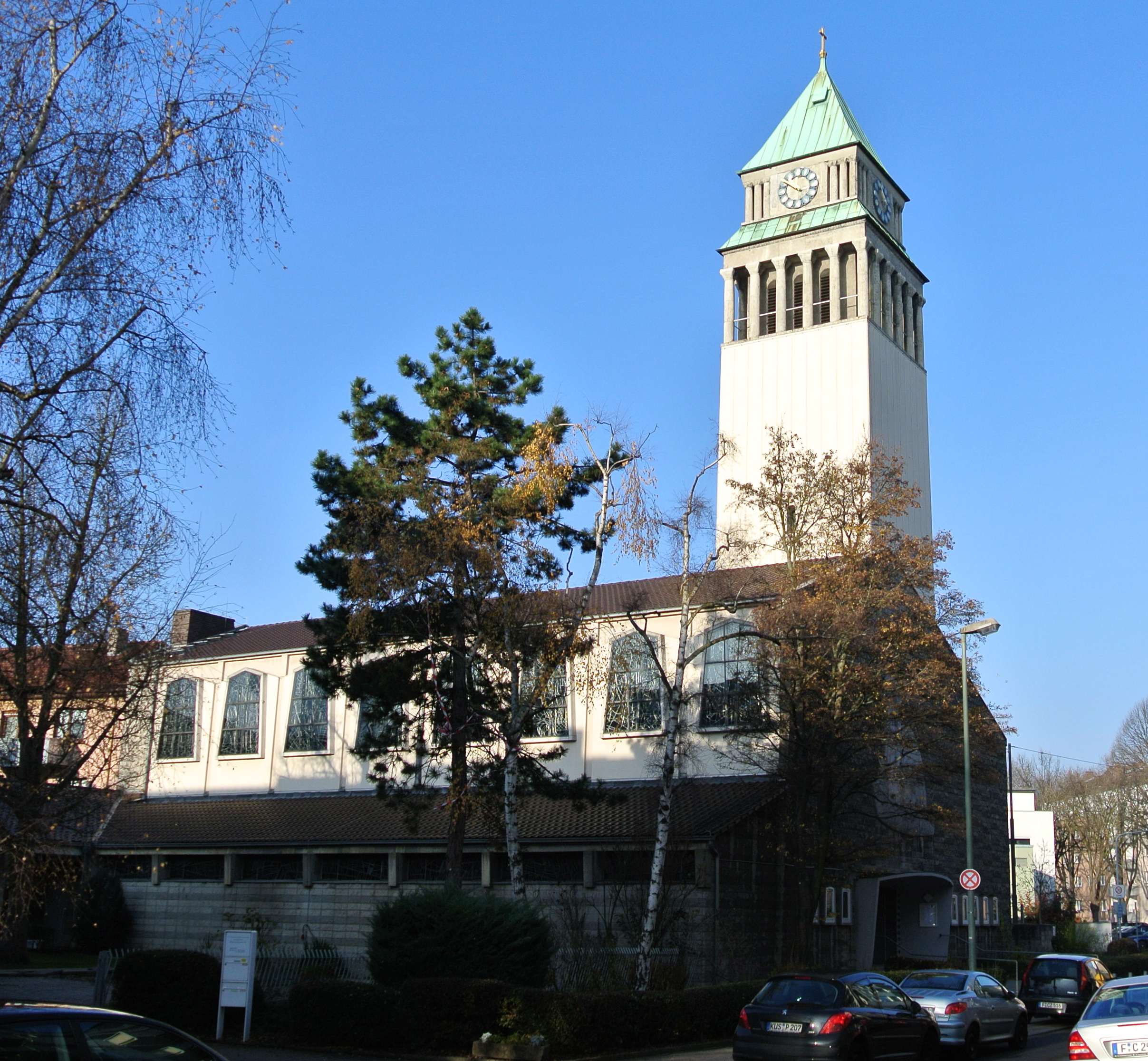 Evangelische Neue Nicolaikirche im Frankfurter Ostend 1909 von Robert Curjel erbaut, nach Kriegszerstörung 1959 von Hans Bartholmes weitgehend neu aufgebaut, Ansicht von Südosten